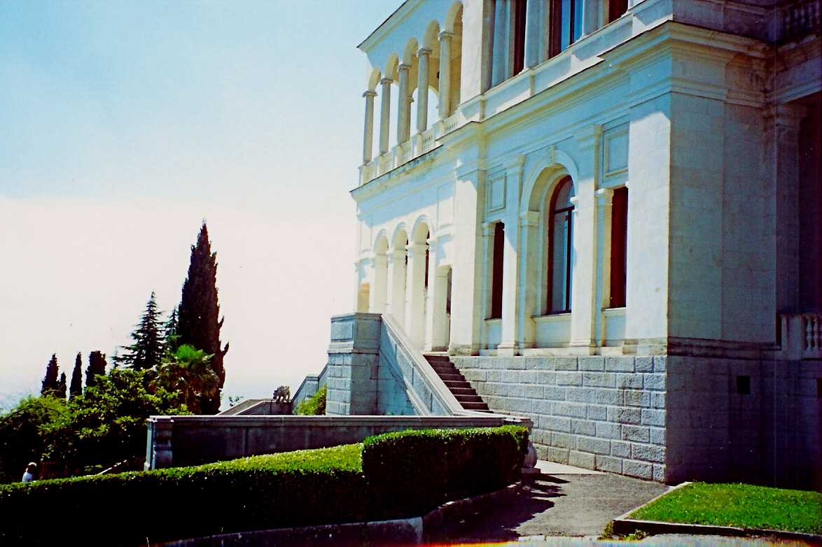 Konferenzgebäi vu Jalta (Krimhallefinsel).